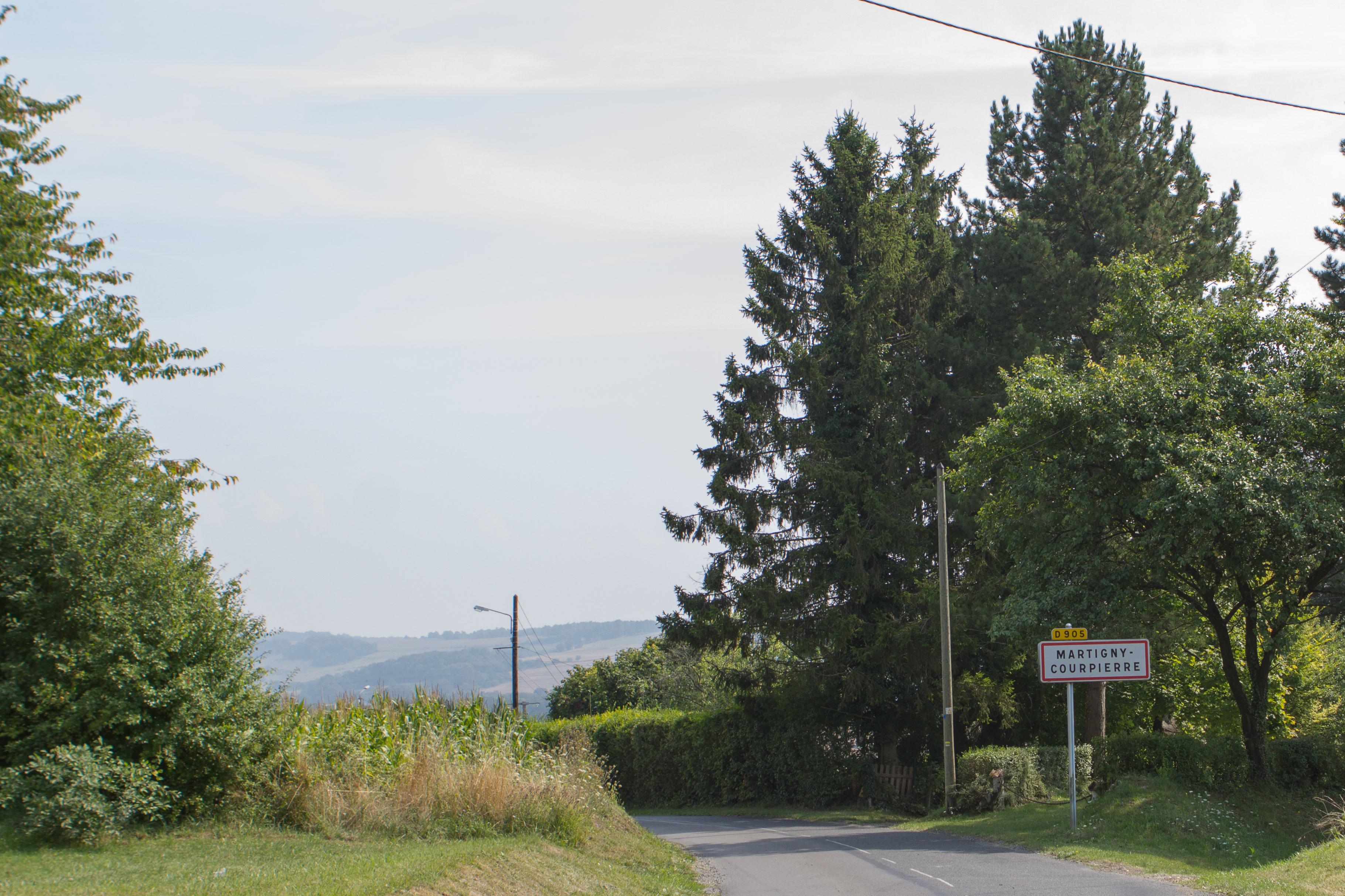 Entrée nord de Martigny-Courpierre (D905), Martigny-Courpierre, Aisne, France